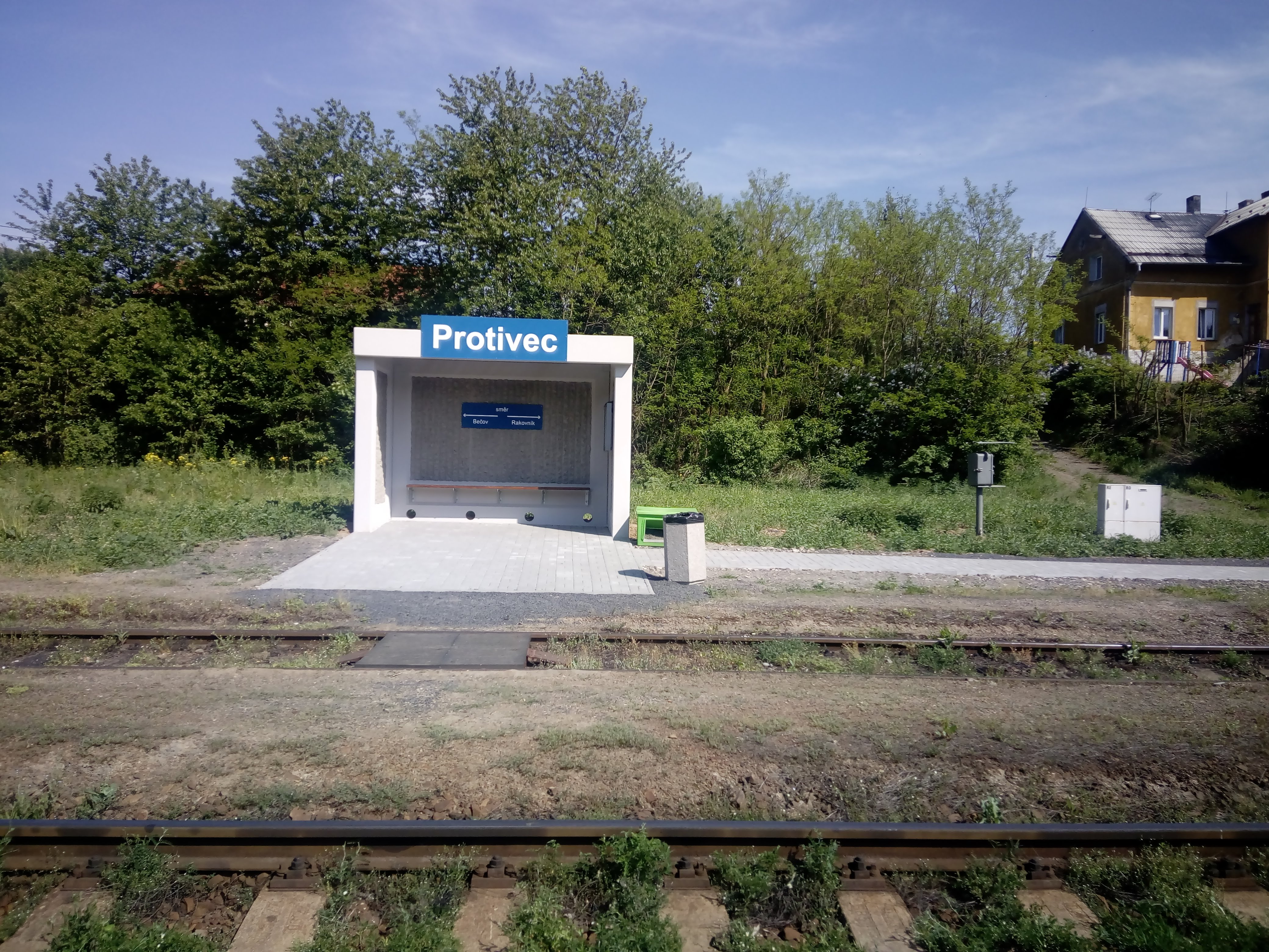 Zastávka nahradila původní nádraží v roce 2017.